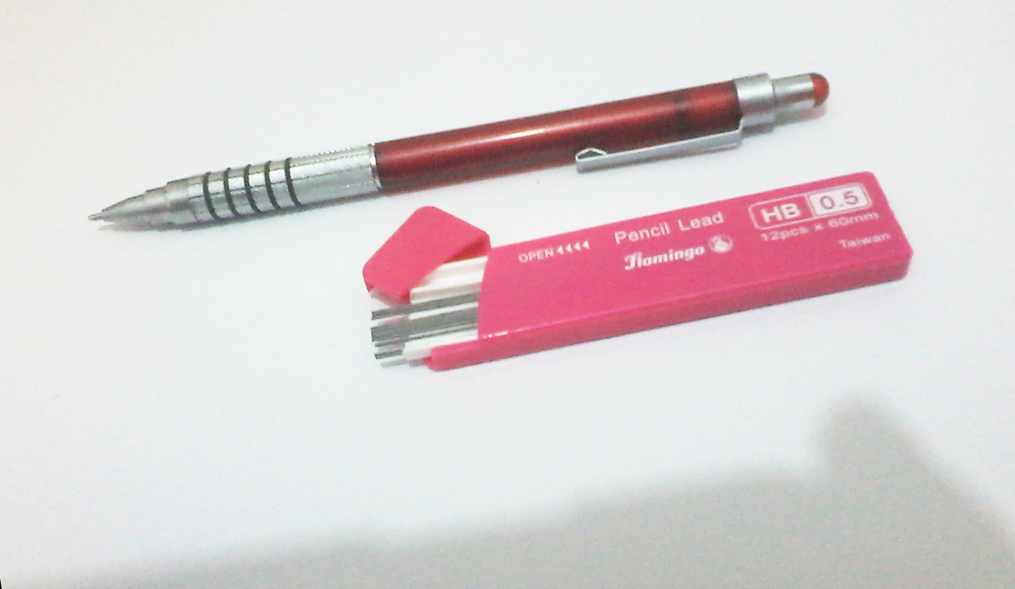 قلم كباس قبم سنون